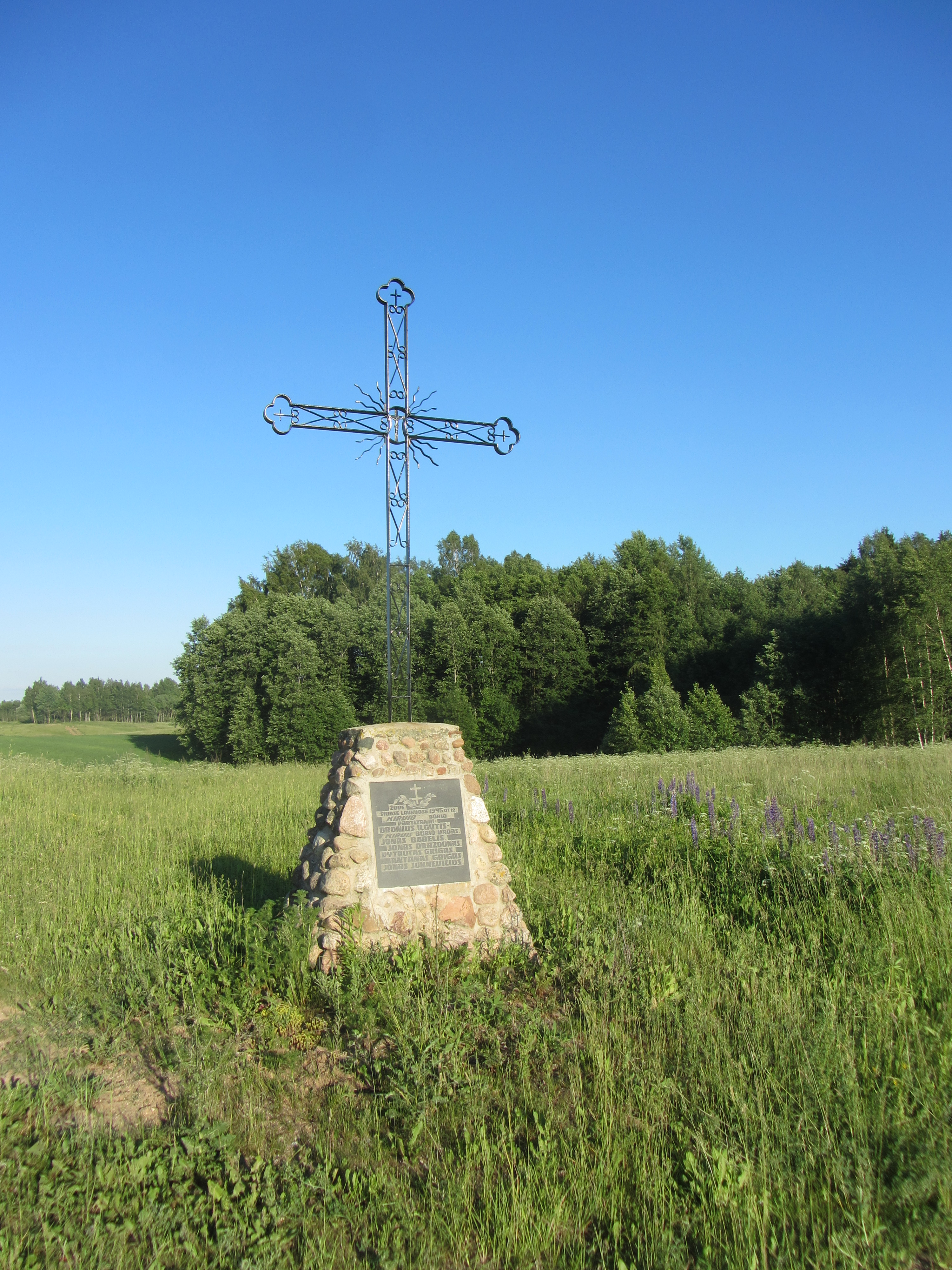 Skiemonių sen., Lithuania